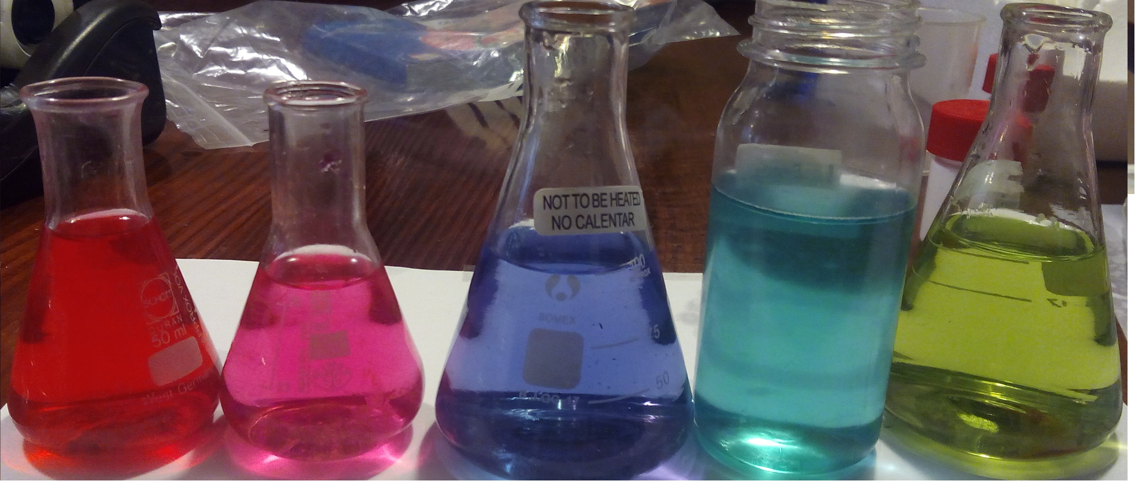 Jugo lombarda con disoluciones de agua fuerte (HCl), acetico (CH3COOH), agua, bicarbonto (NaHCO3) y amoniaco (NH3).